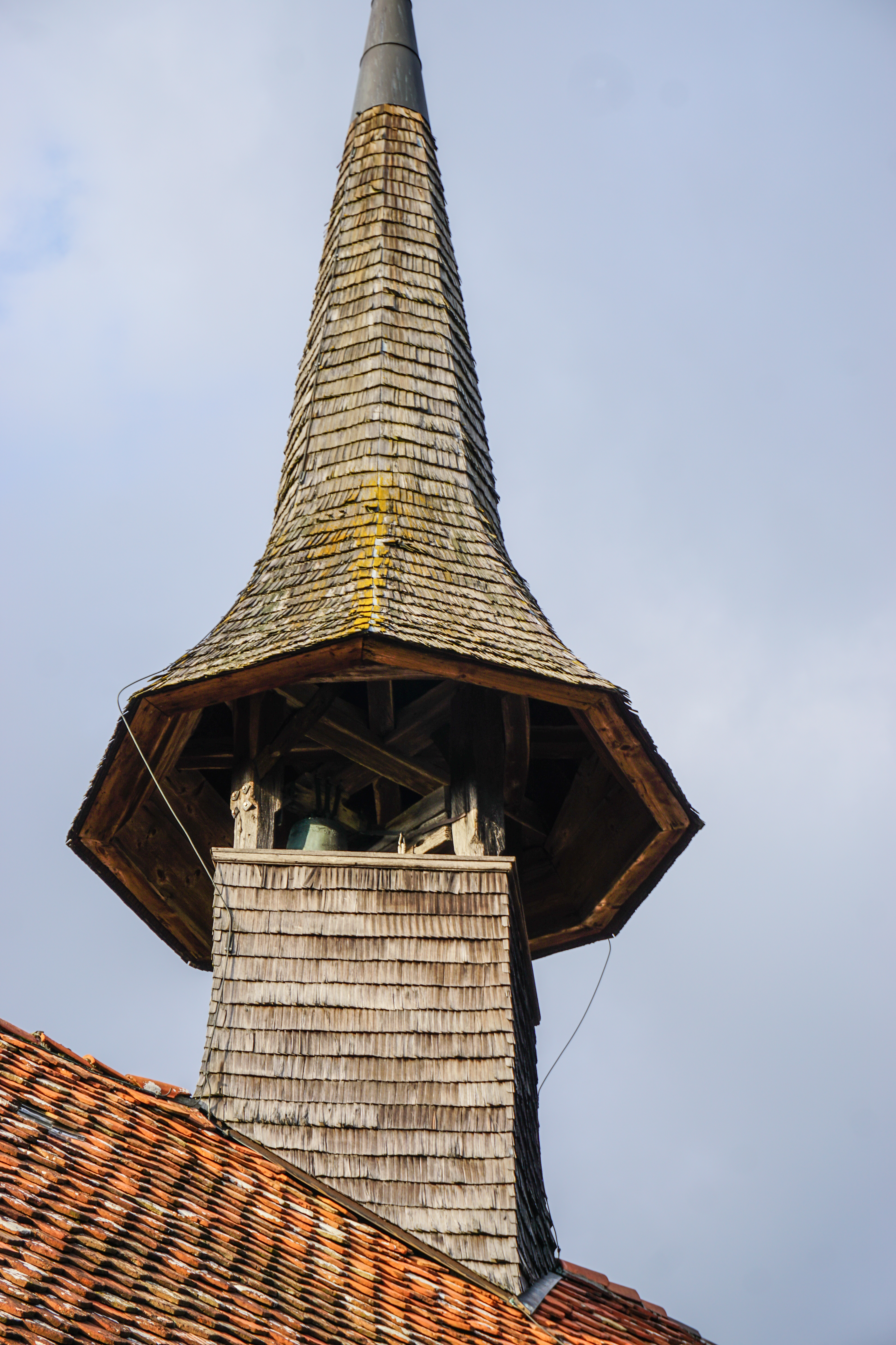 Rüti bei Lyssach, Kirche, Dachreiter.